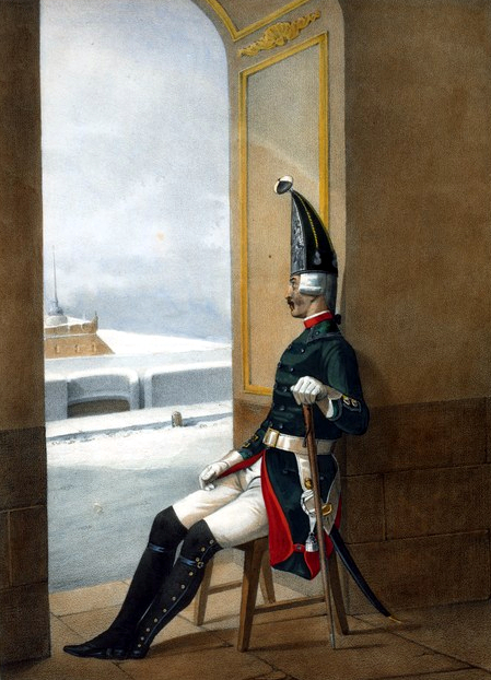 Гренадерский Унтер-офицер Белевского Мушкетерского полка. 1797-1801.